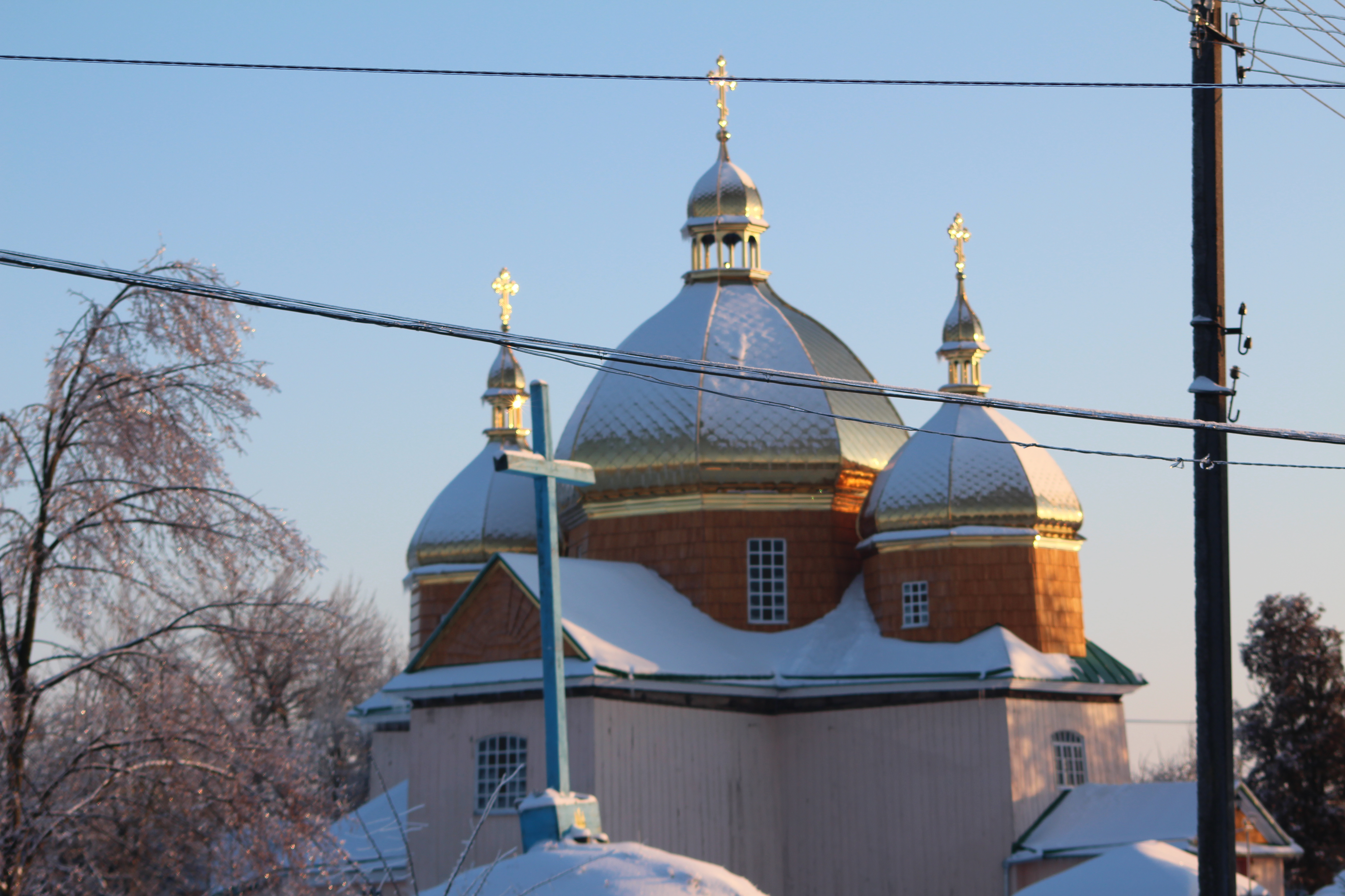 Церква святого Михаїла